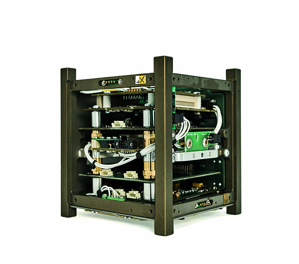 Satellite "ouvert"